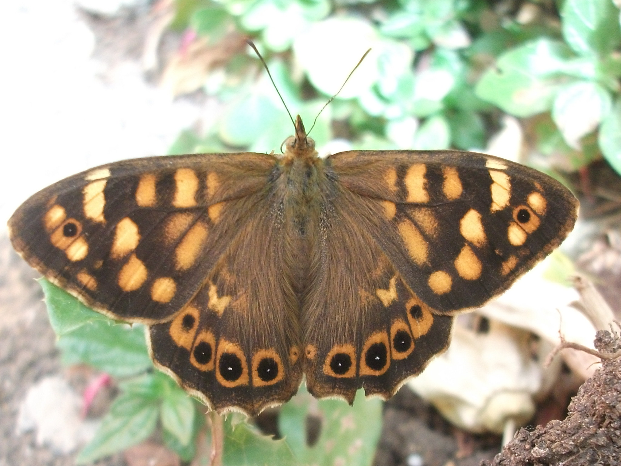 Foto tomada en Tegueste, Tenerife.